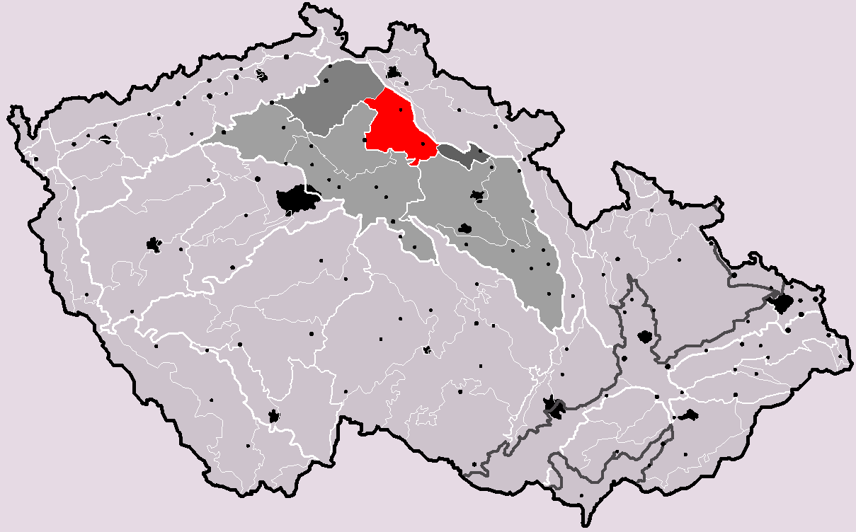 Česky: Poloha geomorfologického podcelku Turnovská pahorkatina v rámci České republiky. Hercynský systém Hercynská pohoří I Česká vysočina I6 (VI) Česká tabule I6A (VIA) Severočeská tabule I6A-2 (VIA-2) Jičínská pahorkatina (VIA-2A) Turnovská pahorkatina